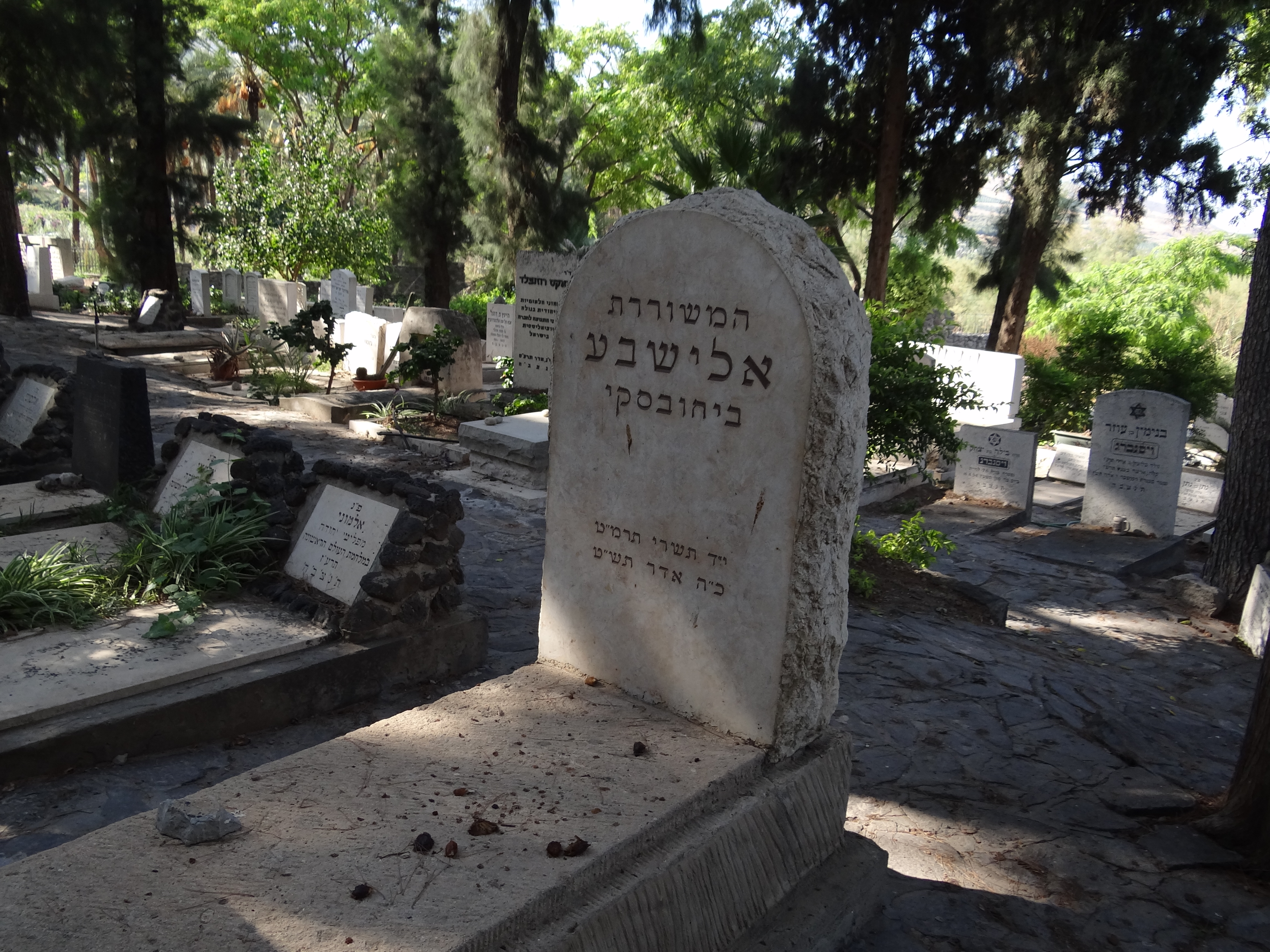 Kinnert Cemetery בית הקברות כנרת הוא בית קברות השוכן לחוף הכנרת, בקרבת המושבה כנרת וקבוצת כנרת.